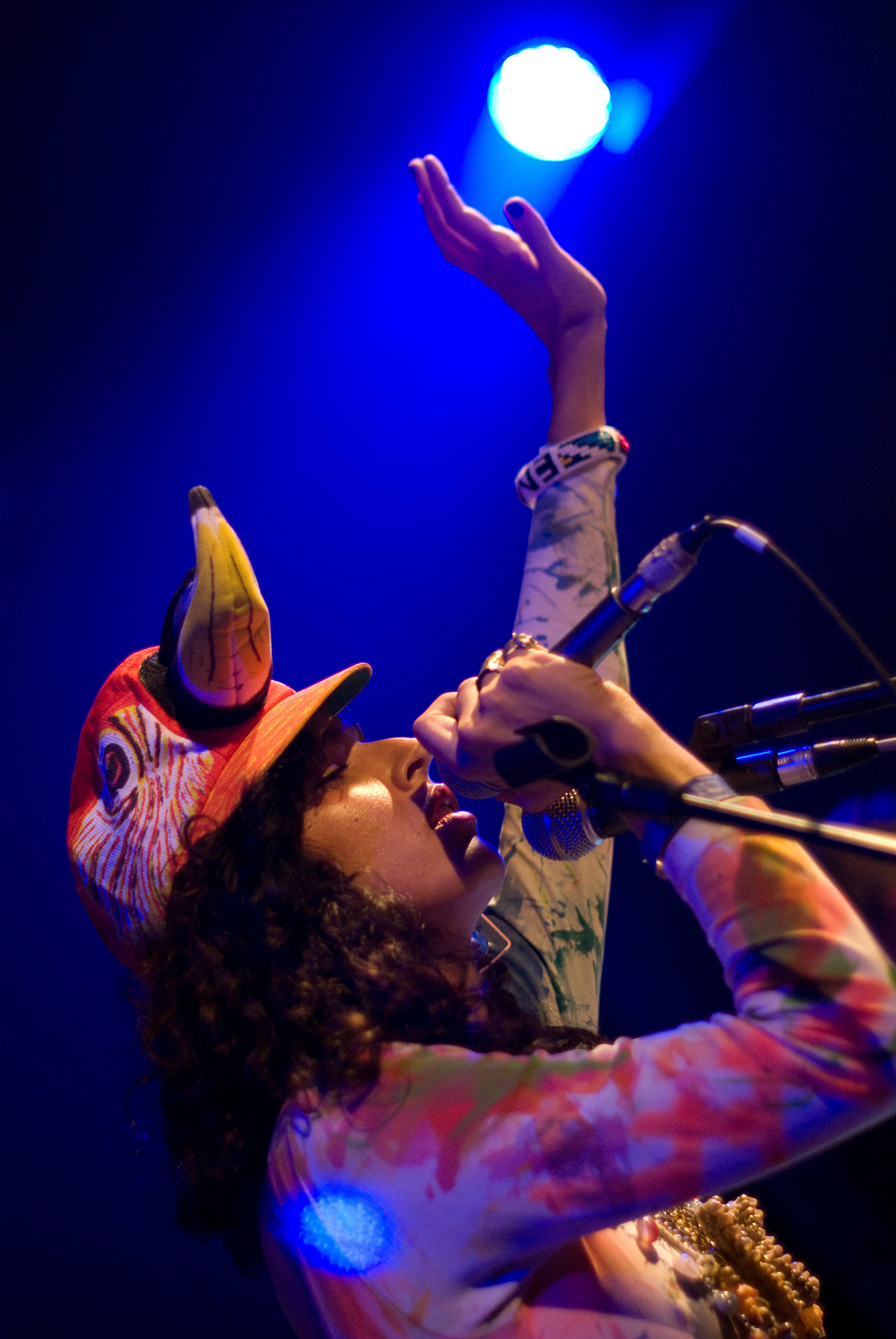 Cibelle live at Studio SP in São Paulo, Brazil.cibelle @ studio sp